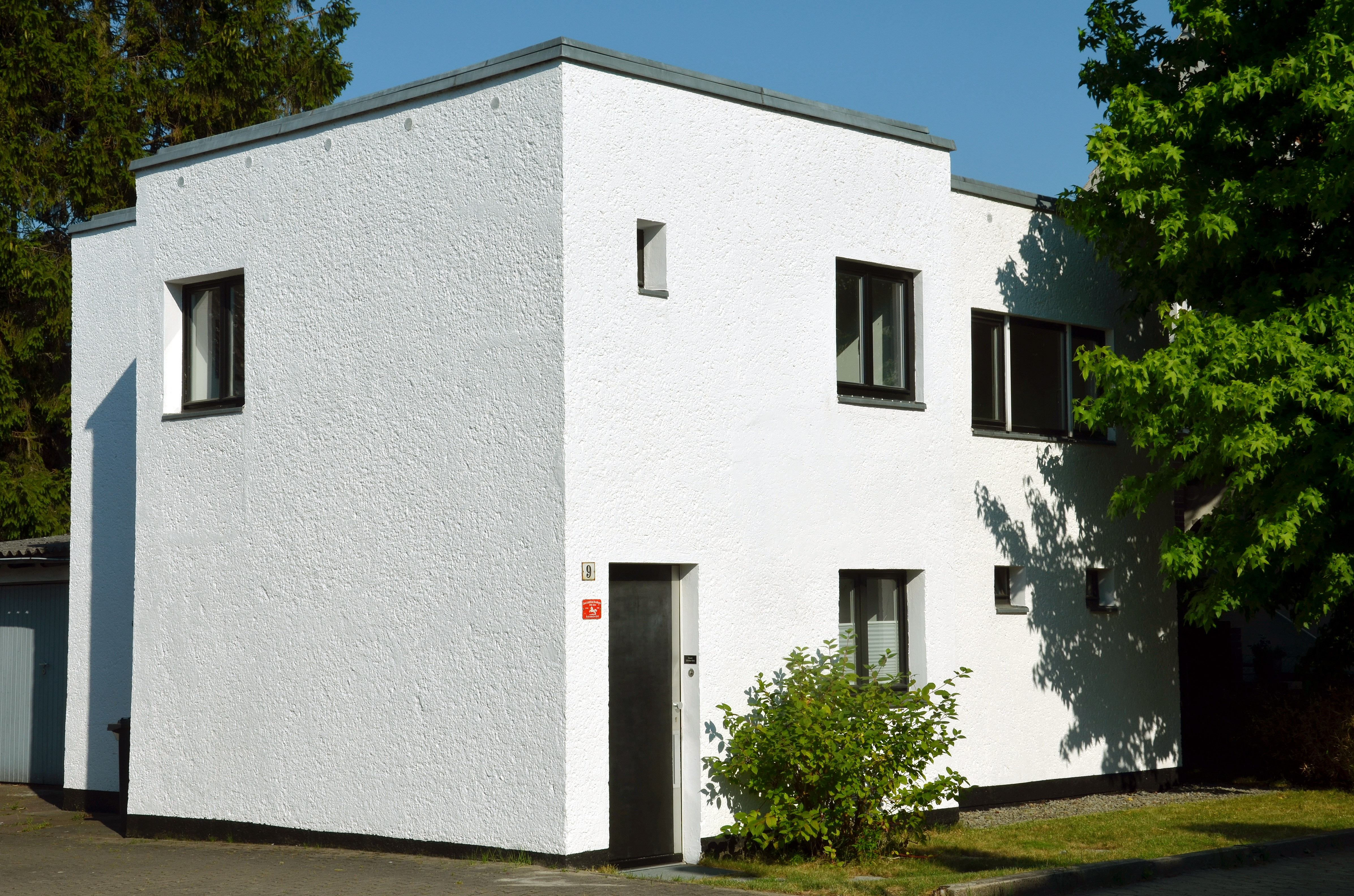 In der 1930 ursprünglich als Friedrich-Ebert-Straße angelegten Straße in Misburg, (heute: Kleinerstraße im hannoverschen Stadtteil Misburg-Nord) errichtete der Architekt Otto Haesler im Rahmen der Genossenschaftssiedlung Heimfrieden und im Sinne des Neuen Bauens die vier Häuser mit den Hausnummer 3, 5, 7 und 9 ...